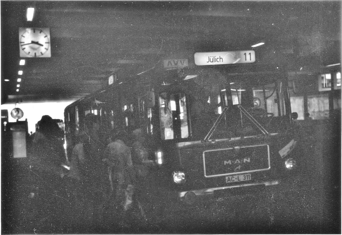 So sah der Ersatz für die Bahnstrecke Aachen Nord - Jülich aus, fotografiert ein Jahr nach der Stilllegung im Aachener Bushof, wo diese Fahrt der Linie 11 von Siegel nach Jülich auf ihre planmäßige Abfahrtszeit (15.47) wartete. Dieser MAN-Gelenkbus vom Typ SG 192 war von 1977 bis 1987 bei der ASEAG im Einsatz. In Aachen Bushof benutzte die Linie 11 den Halteplatz Nr. 2 mindestens während der Fahrplanjahre 1980/81 und 1981/82. Im Mai 1982 wurde in der Peterstraße (Ecke Blondelstraße) ein neuer Halteplatz Nr. 15 (heute Nr. 12) eingerichtet, den die Linien 1/11/21 von da an benutzten. Lageplan heute